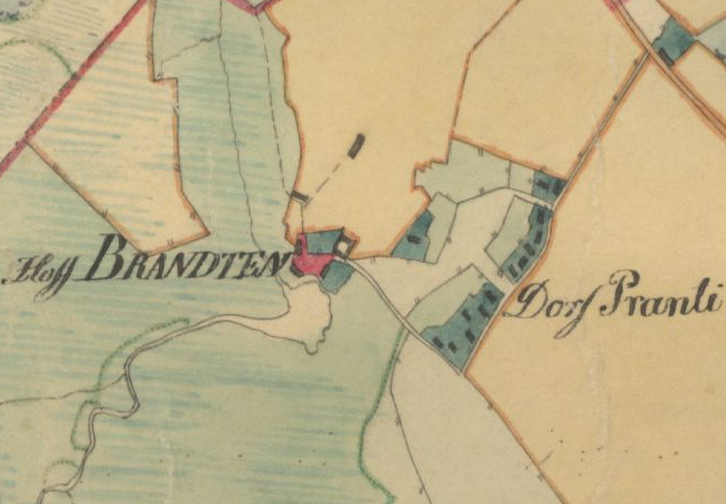 Prandi küla ja mõisa kaart 19. sajandi keskelt.